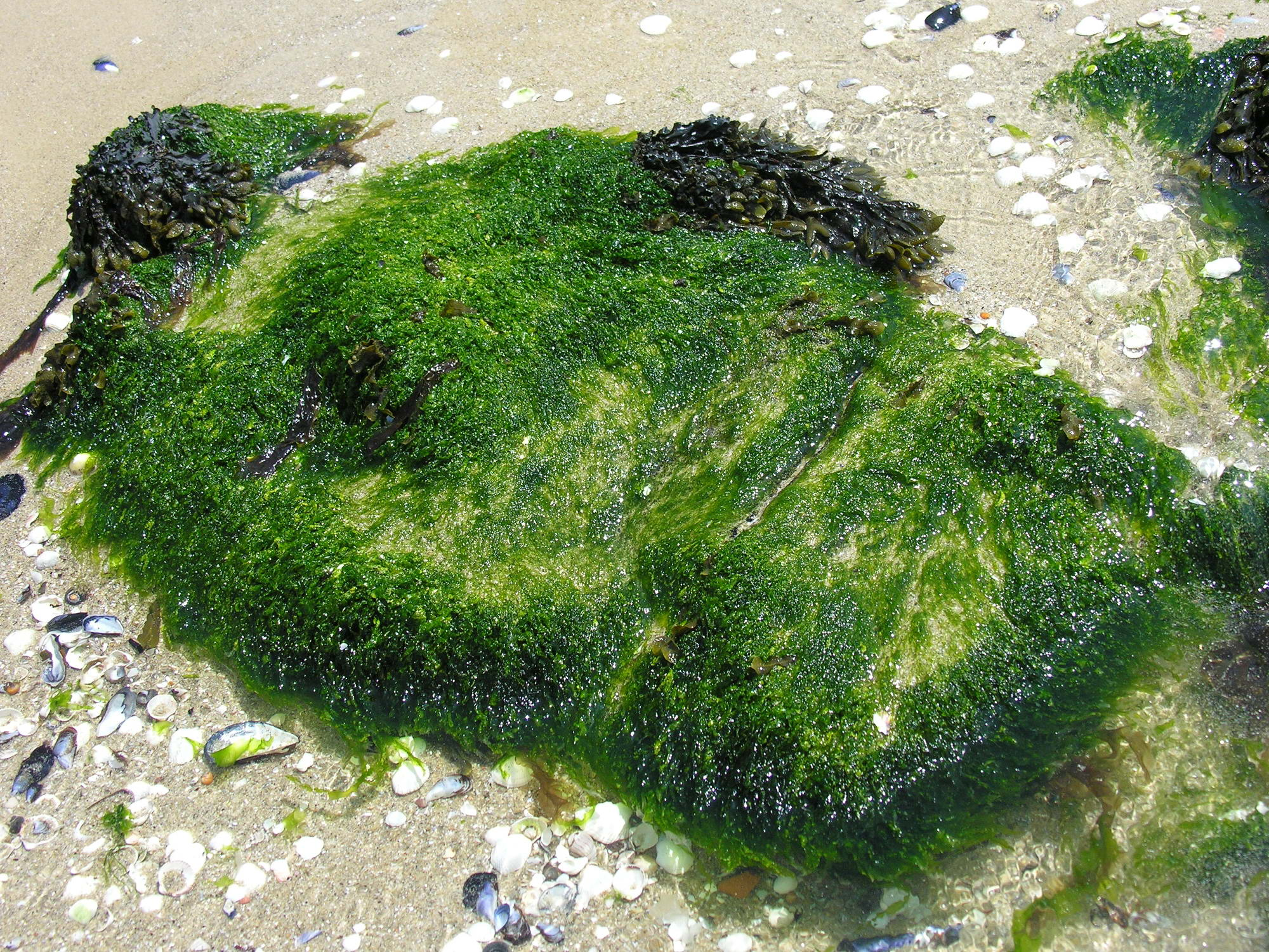 Algas da Praia de Boa, Noia, Galiza, Spain.